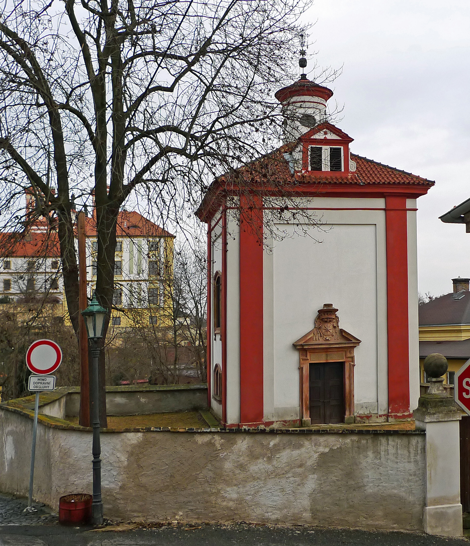 Kaple sv. Jana Křtitele (Litoměřice), Na Dubíně, Litoměřice